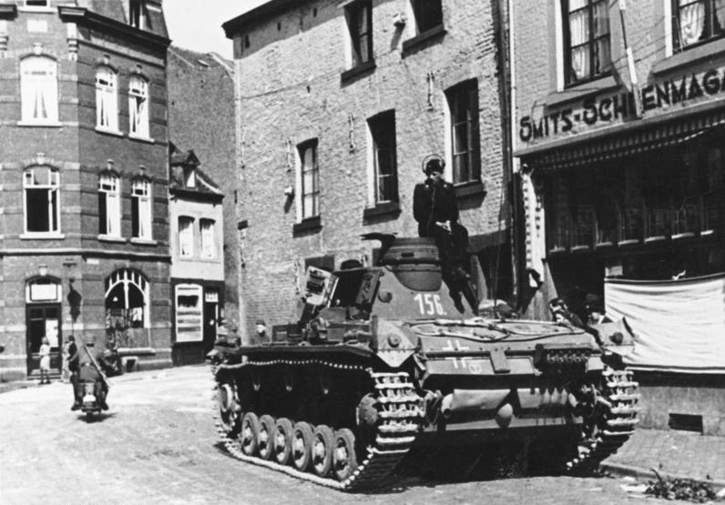 Maastricht. Marschpause der Panzerkampfwagen. Bau einer Behelfsbrücke muss abgewartet werden. 10.5.40